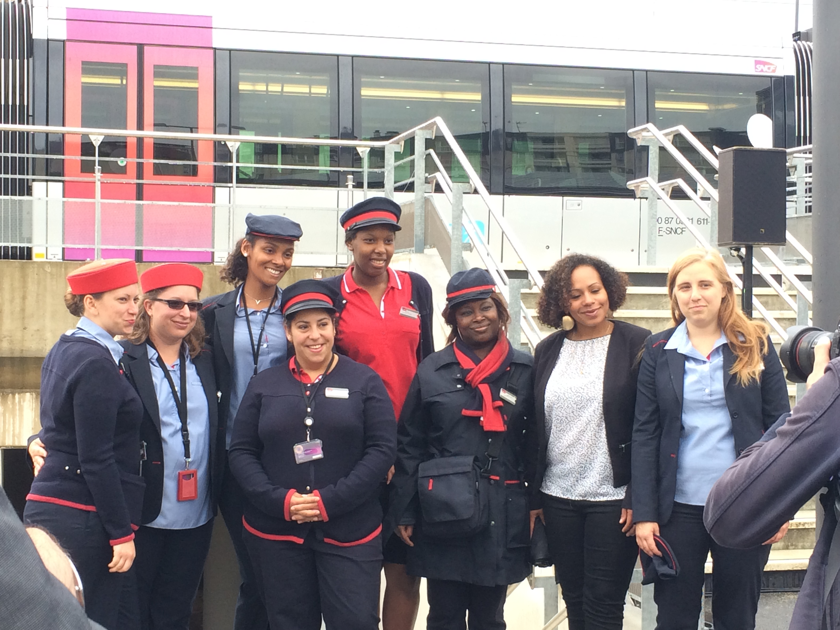 Des salariées de Transkeo T11 Express à la gare d'Epinay. Au fond, des Citadis Dualis